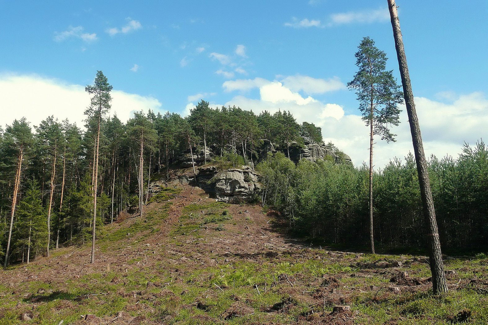 Židovský vrch od západu